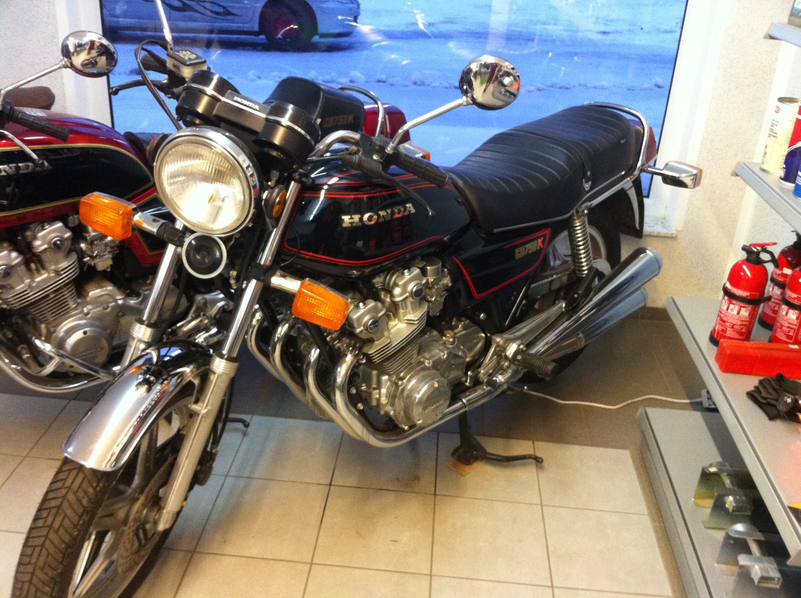 CB 750K im Originallack und mit serienmäßiger 4in4 Auspuffanlage